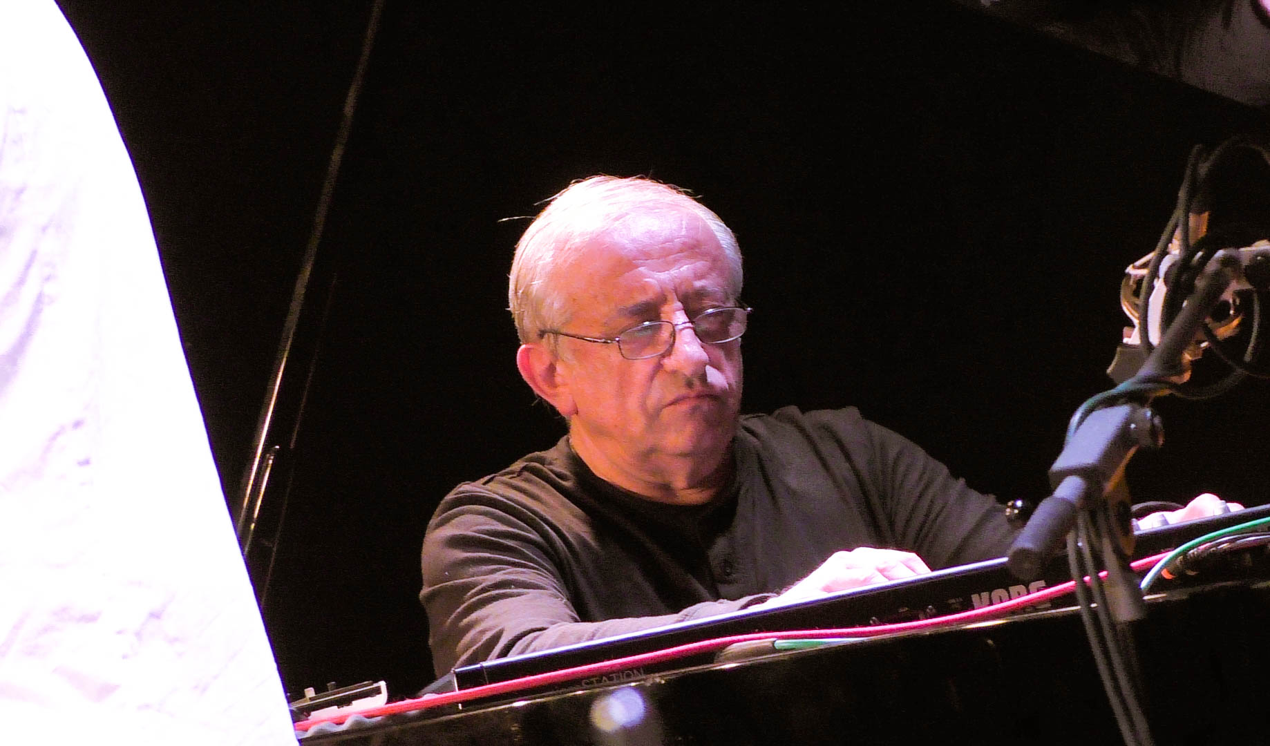 13.11.2017. КЦ ДОМ. Концерт трио Ганелин - Круглов - Юданов.